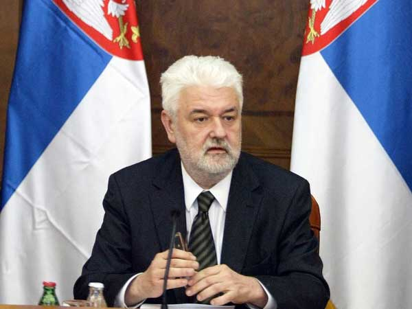 Мирко Цветковић, бивши председник владе Србије